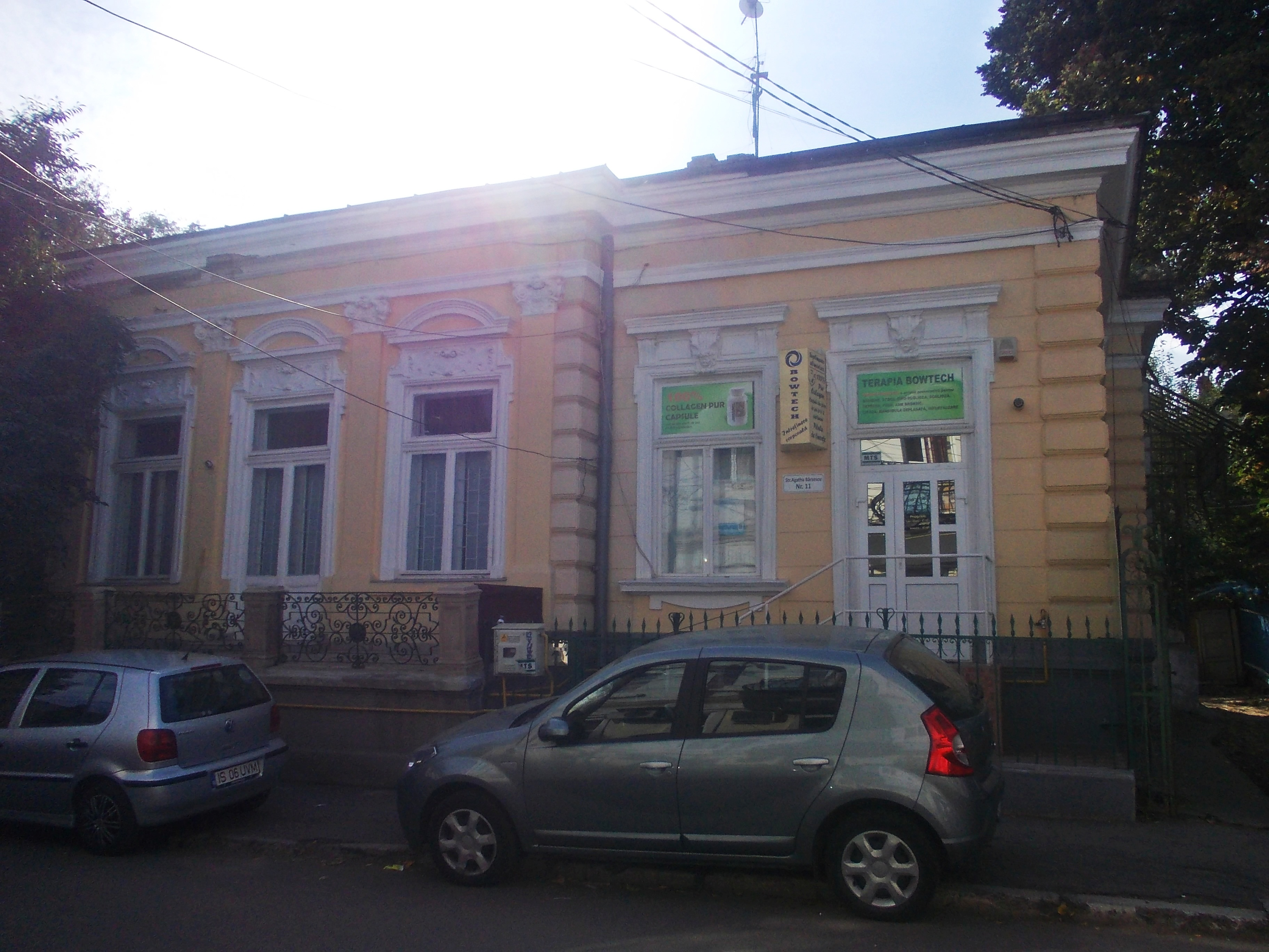 municipiul Iași, Str. Bârsescu Agatha 11